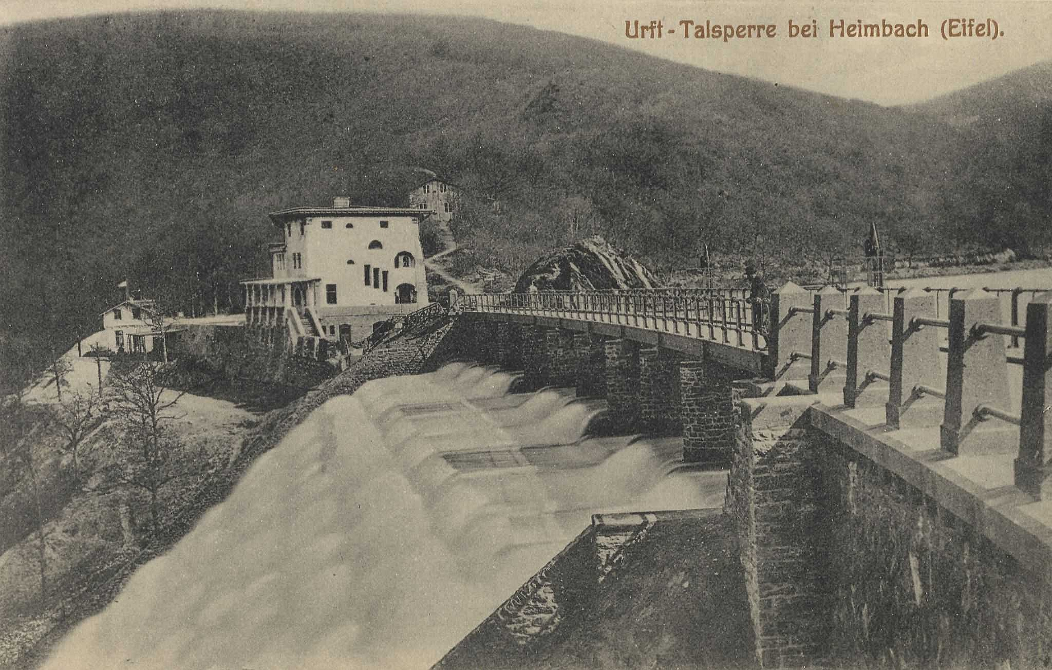 Die Urfttalsperre bei Heimbach (Eifel) in Deutschland.